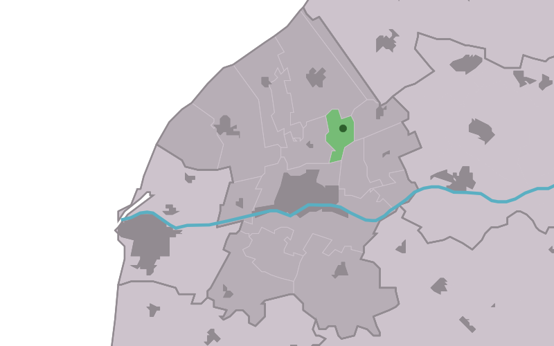 Kaartsje fan himrik fan Boer